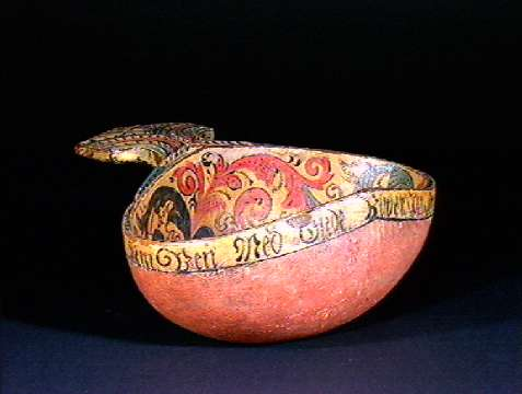 Øløse av bjerk, datert 1766 fra Fyresdal i Telemark. Lengde 30 cm. Norsk Folkemuseum NF.1896-0790.